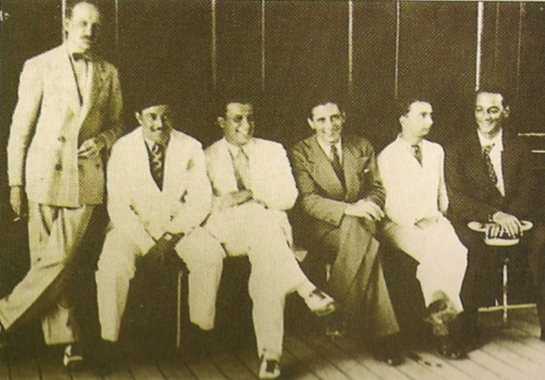 A bordo do navio "Itaquera" os "Azes do Samba" excursionam pelo Sul do Brasil. Da esquerda para a direita: Desconhecido, Pery Cunha (bandolinista gaúcho), Mário Reis e Francisco Alves (cantores), Noel Rosa (compositor) e Nonô (pianista).